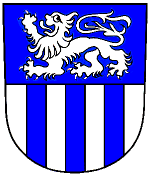 Erstmals schriftlich erwähnt 1406 durch Ulrich von Loo